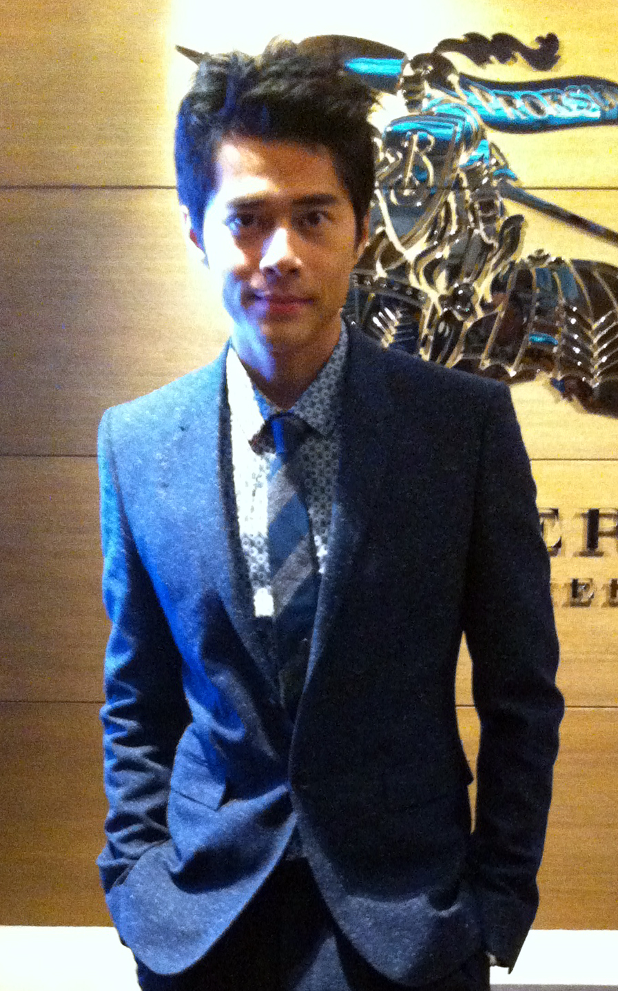 徐天佑的近照。